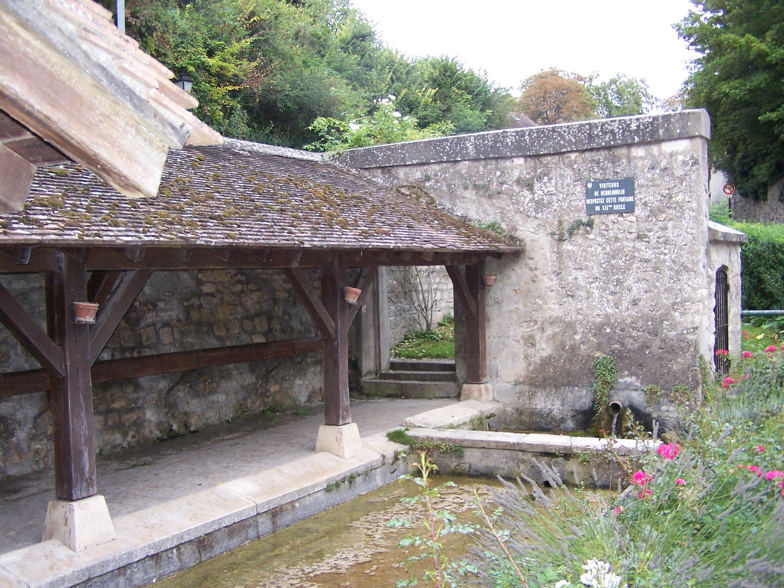 Fontaine Saint-Nicolas à Rennemoulin (Yvelines, France). Photo personnelle. Saint-Nicolas fountain in Rennemoulin (Yvelines, France). Personal photo. Auteur/Author : Henry Salomé